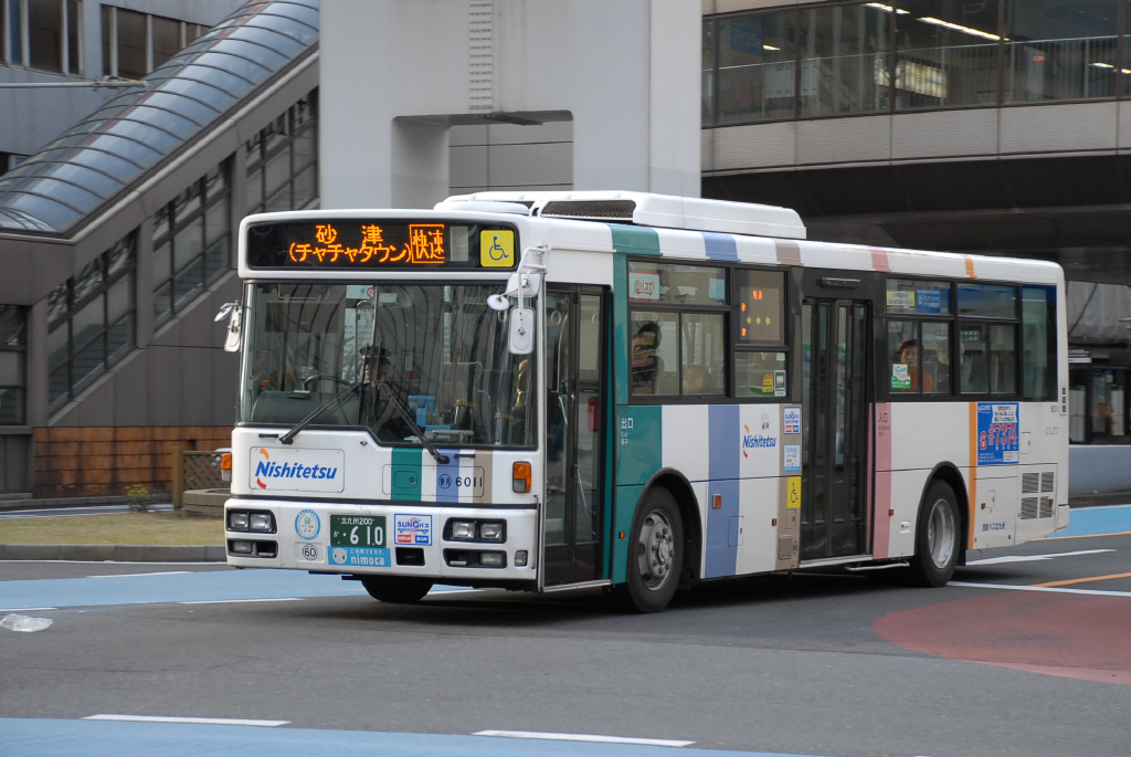 小倉北区にて、2016-4-5撮影